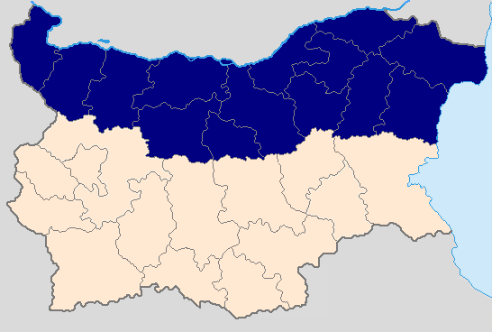 Северна България